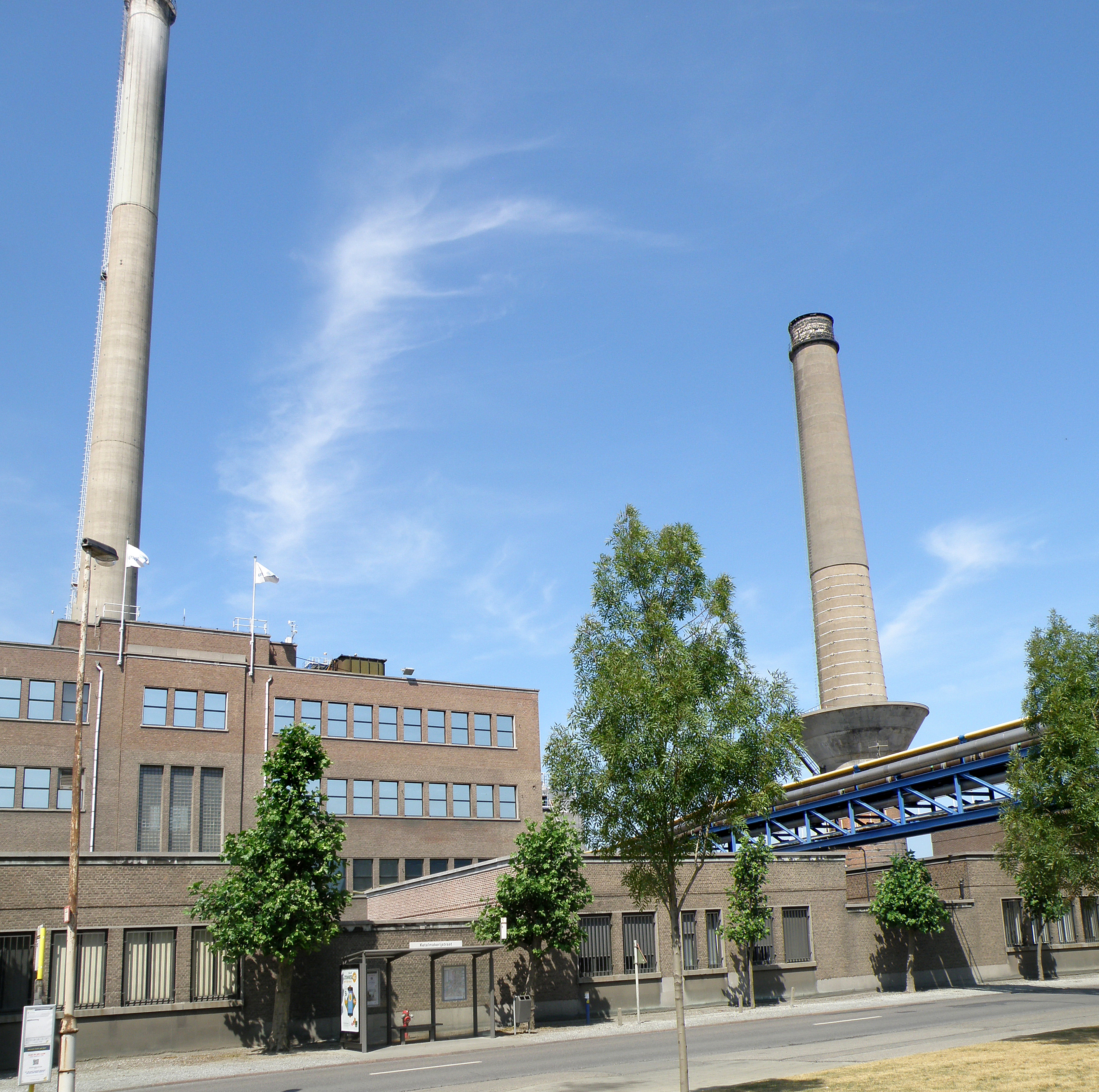 Antwerpen, district Hoboken (België). Umicore-fabrieken, Adolf Greinerstraat.